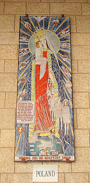 Nazaret, Bazylika Zwiastowania Pańskiego, mozaika w krużgankach maryjnych